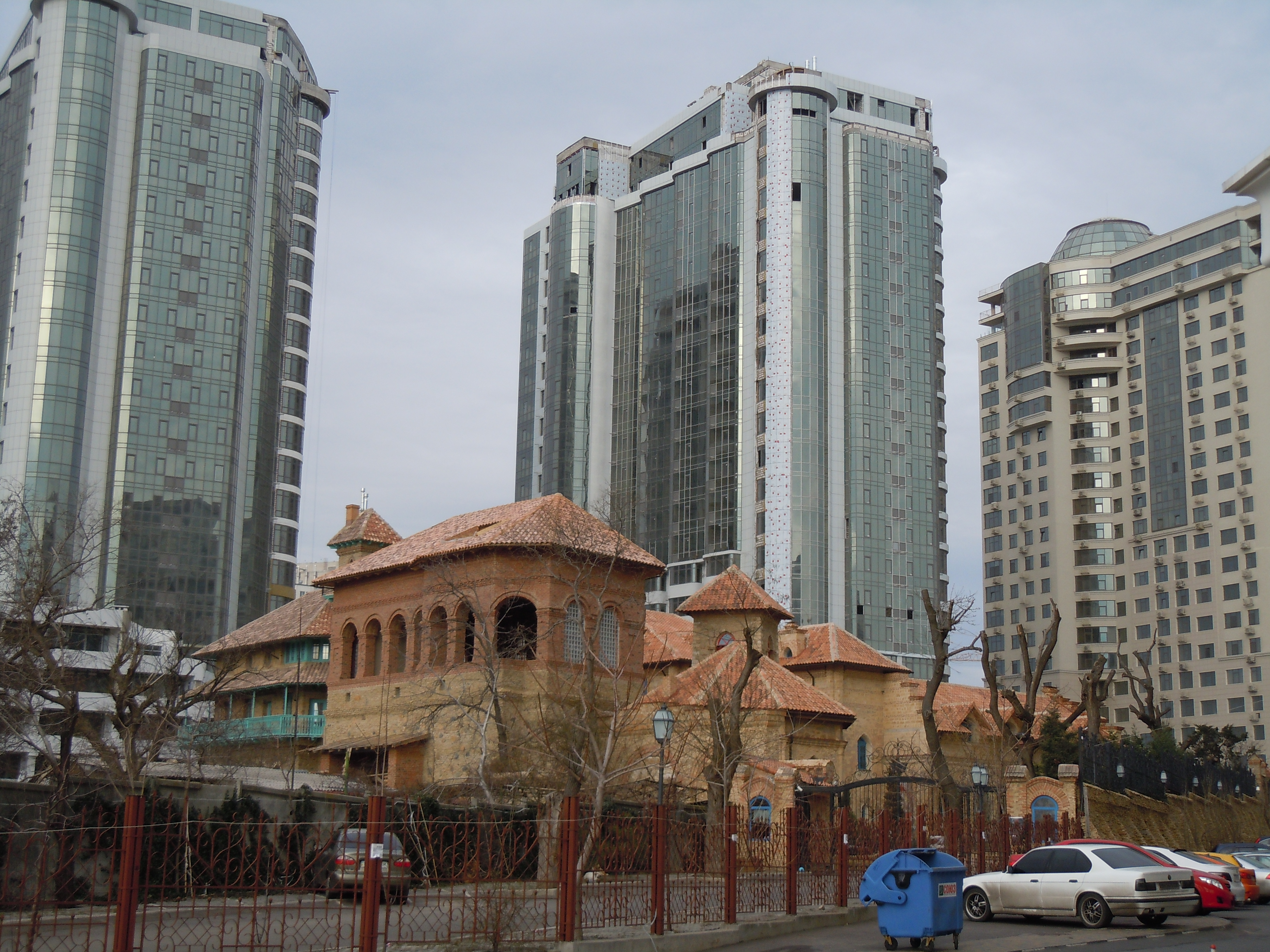 Консульство Кіпру в Одесі, Україна, на Гагарінському плато, Аркадія, на фоні хмарочосів